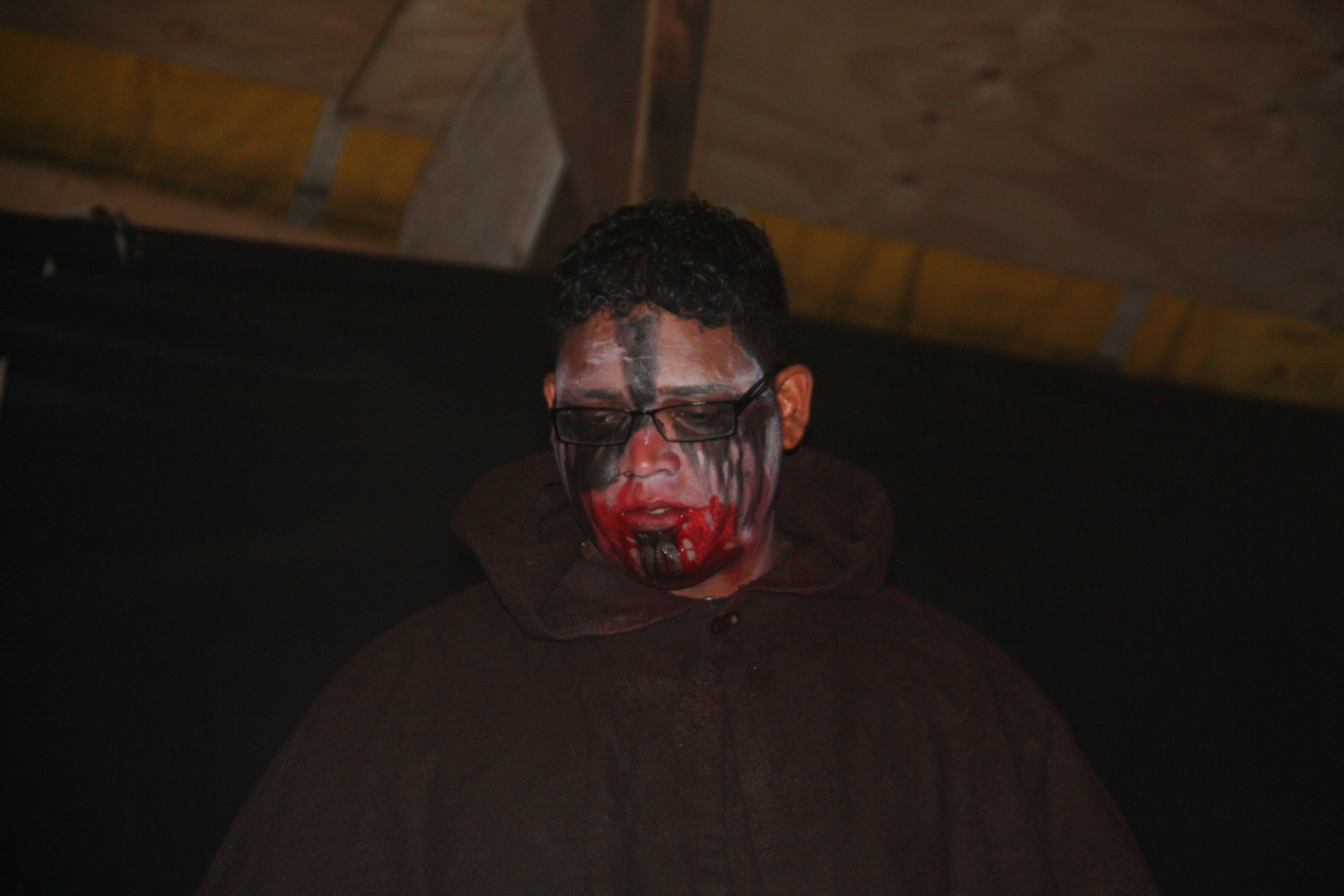 Slechtvalk tijdens Occultfest 2010, zaterdag 4 september